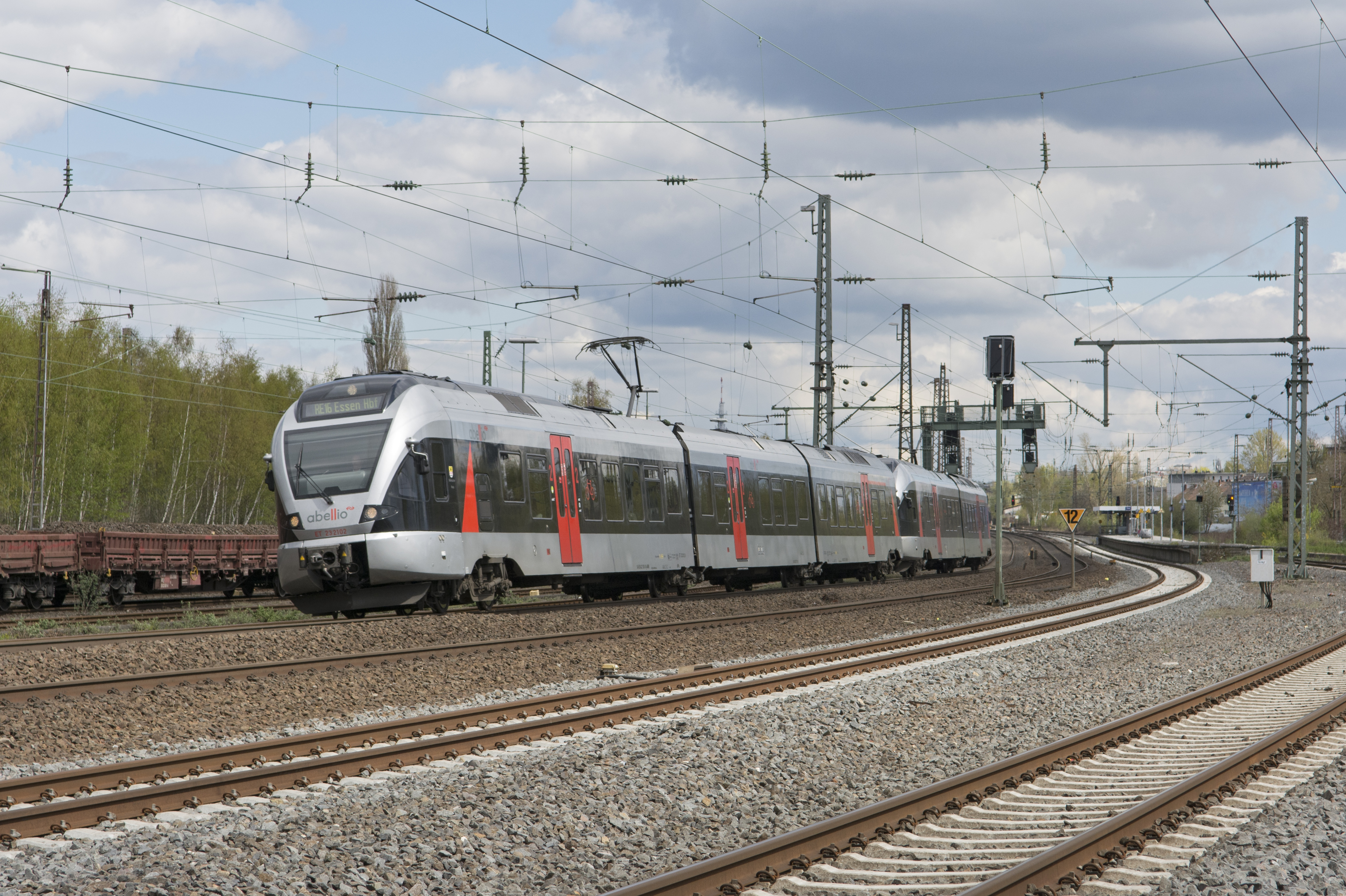 Bochum-Ehrenfeld Albellio ET 232102-222101 (met NS logo) als RE16 (ABR89523) Essen. Deze treinen komen eind 2017 ook naar Arnhem